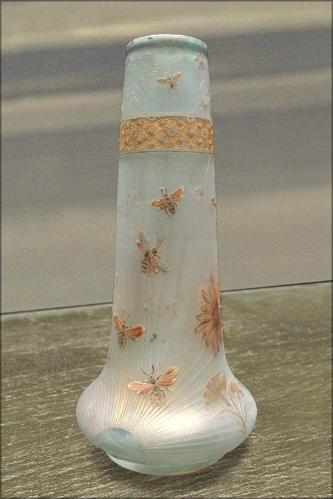 Vase "bouquet de marguerites" réalisé à l'occasion du mariage d'Antonin Daum 1897 Verre soufflé-moulé, gravé à l'acide et à la roue, peint à l'émail et rehaussé d'or. Pied en application La collection DAUM au musée des Beaux-Arts de Nancy